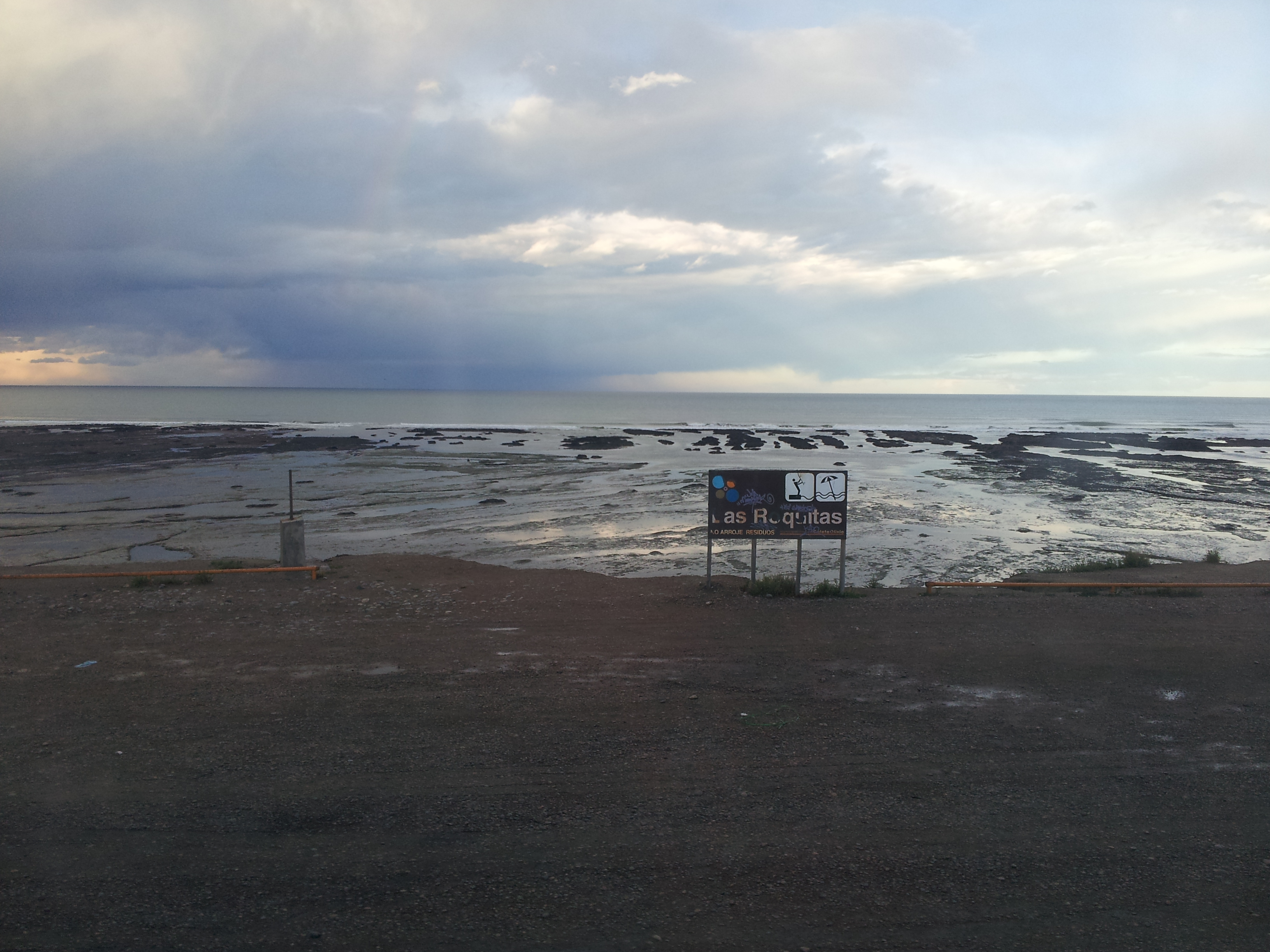 Vista Playa Las Roquitas (Santa Cruz)